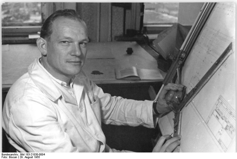 Ingenieur am Reissbrett Zentralbild Biscan Kno-Bod 29.8.1953 Freude und Dankbarkeit über das "Moskauer Protokoll" Die Belegschaft einer SAG zur Rückgabe ihres Betriebes. Unser Reporter besuchte den Schwermaschinenbau "7.Oktober" in Magdeburg, eine der 35´3 sowjetischen Aktiengesellschaften, die den Moskauer Protokoll zufolge am 1.1.1954 in den Besitz des deutschen Volkes überführt werde, und befragte einige Werktätige nach ihrer Meinung über diese Vereinbarung zwischen der Sowjetunion und der DDR. Hier ihre Antworten: UBz: Konstrukteur Ingenieur Walter Salac erklärt:"Es erfüllt mich mit groser Freude, dass auch unser Werk volkseigen wird. Wir waren in den vergangenen Jahren mit Reparations- und Exportlieferungen voll eingedeckt. Ich rechne mit Bestimmtheit damit, dass wir auch in Zukunft genügend Freundschaftsverträge erhalten, um den Betrieb weiter ausbauen zu können. Wir Ingenieure sind bereit, gemeinsam mit den Arbeitern unseres Werks alle in Frage kommenden Aufgaben zu lösen."